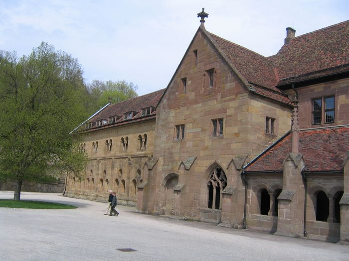 Klosterfront Maulbronn